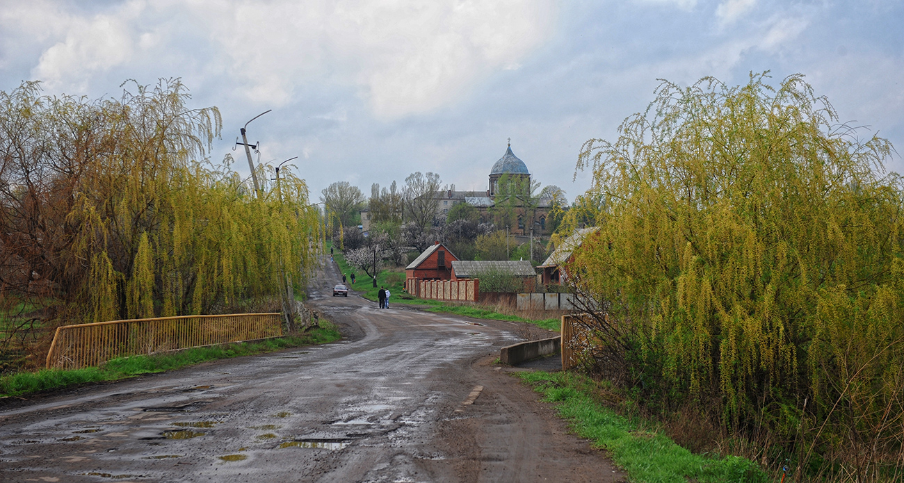 2012 Верхнеторецкое